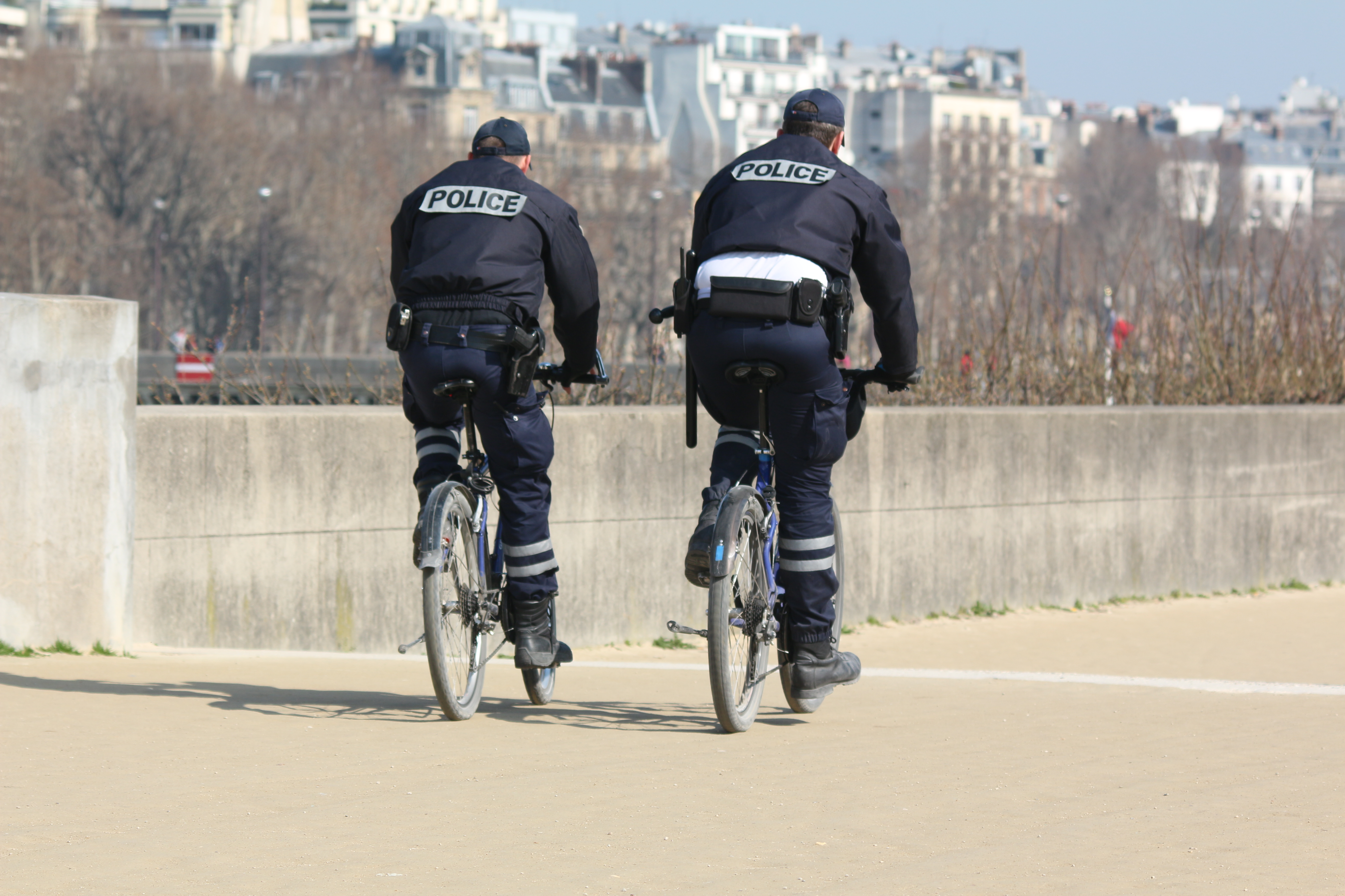 Zwei Fahrradpolizisten am Seine-Ufer in Paris unweit des Eiffelturms